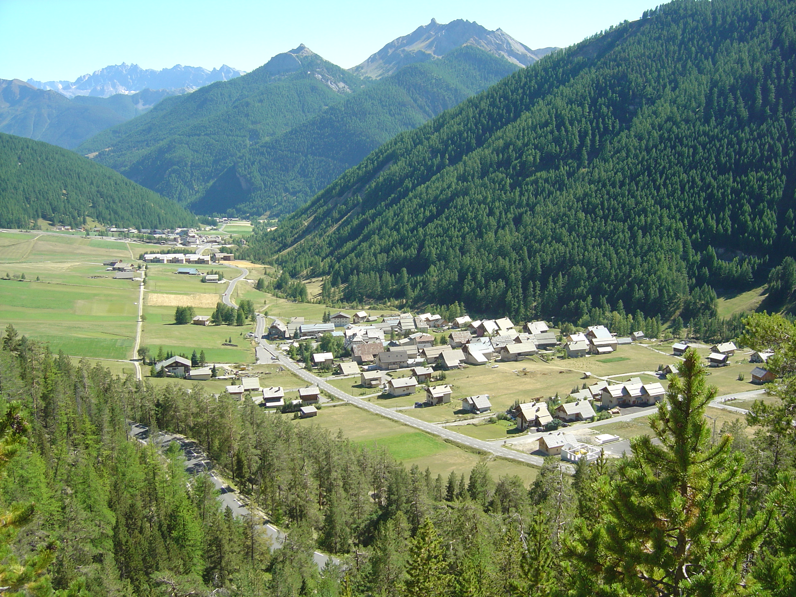 En bas, la ligne droite de Brunissard. Au fond, Arvieux.